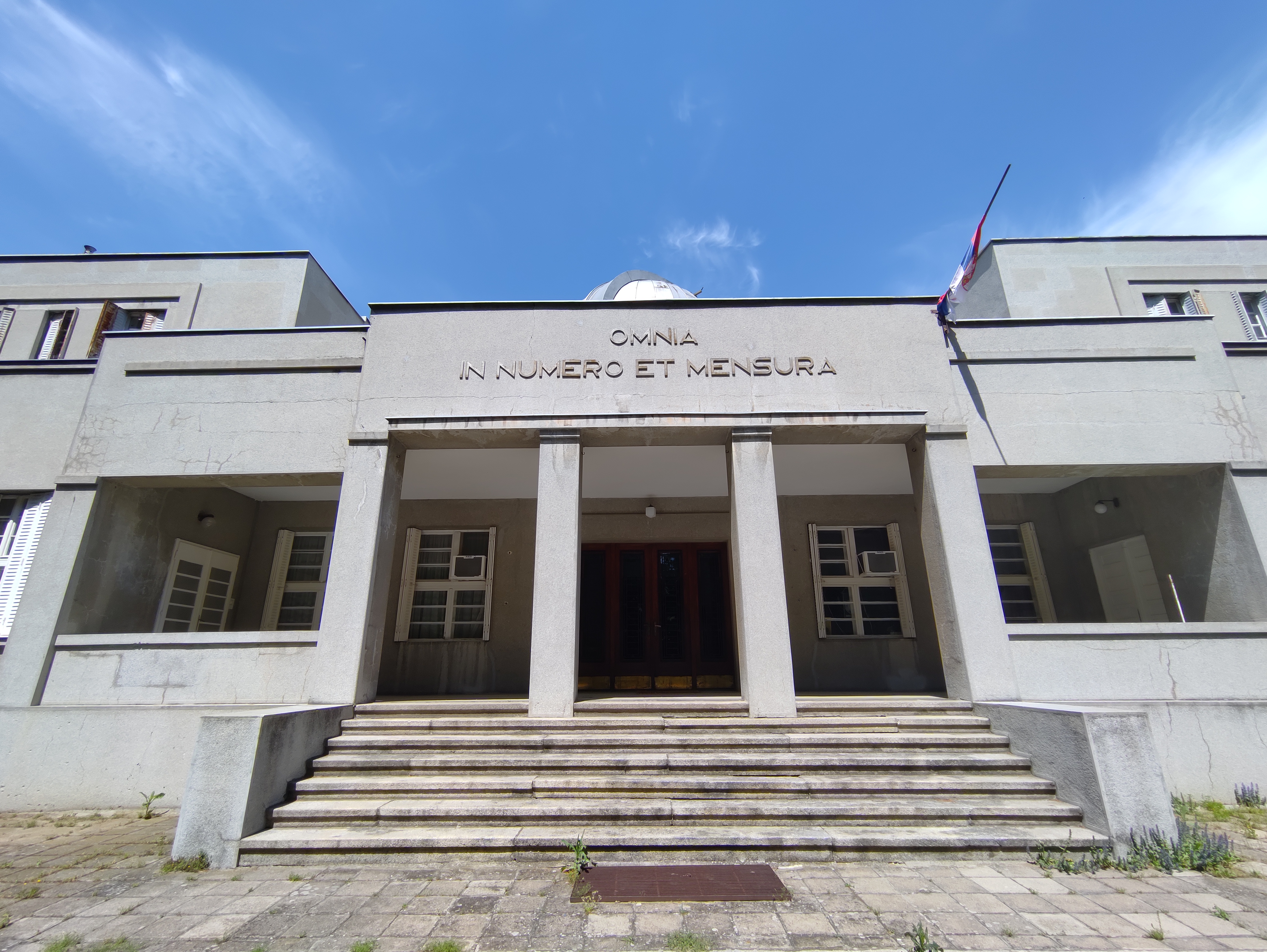 Autor by Snežana Negovanović